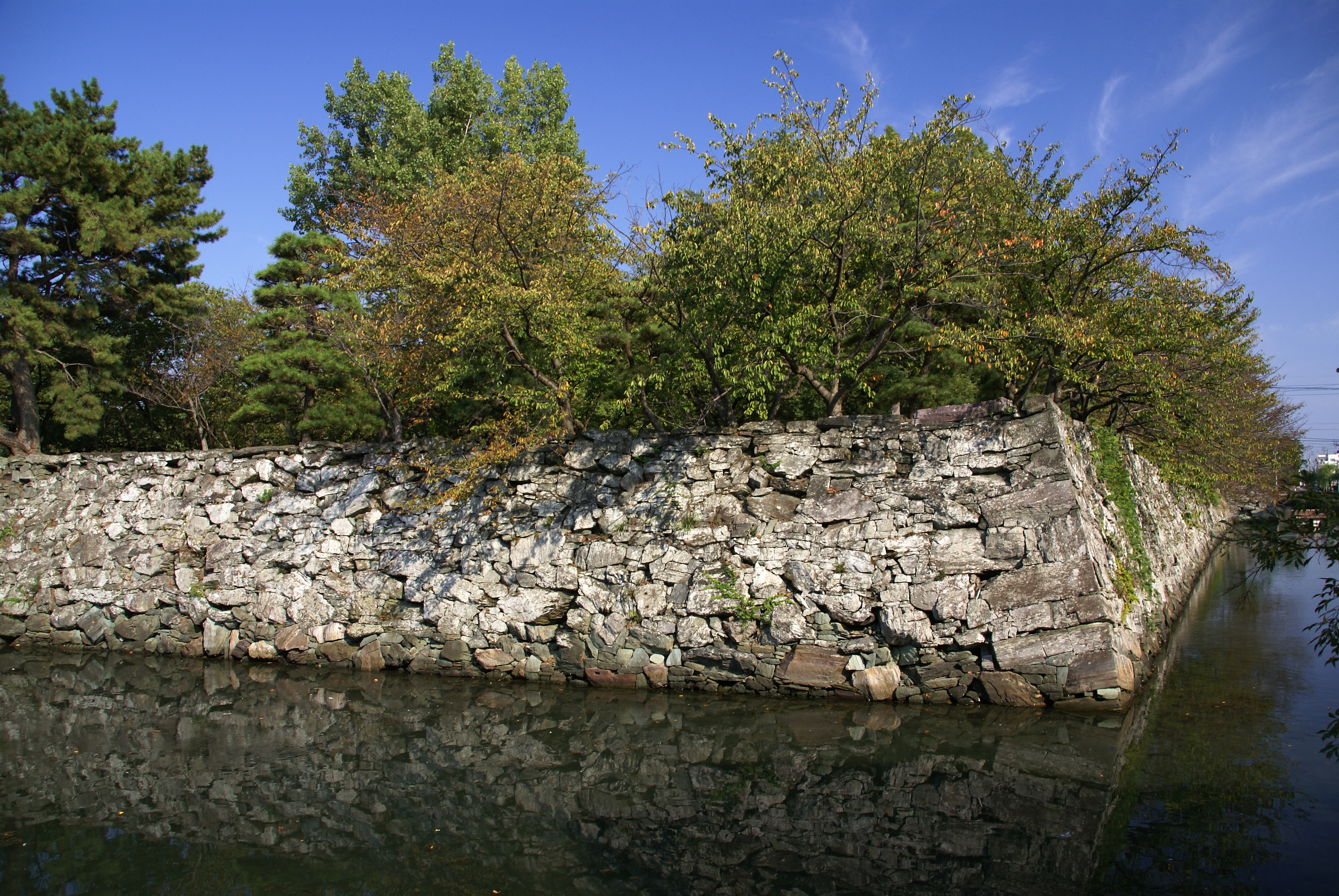 Tokushima Castle in Tokushima, Tokushima prefecture, Japan